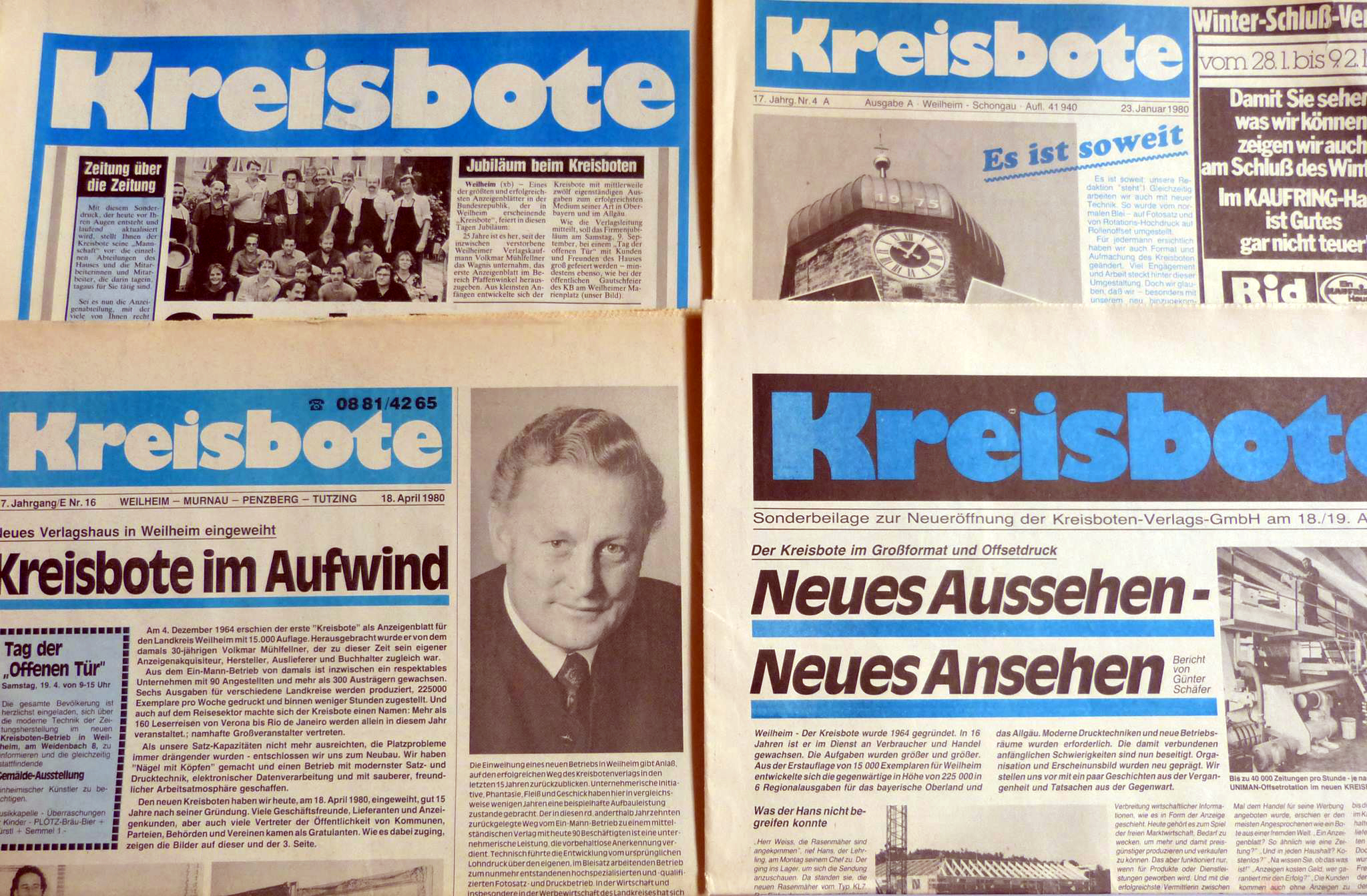 Historische Titelseiten des Kreisboten, teilweise Sonderveröffentlichungen